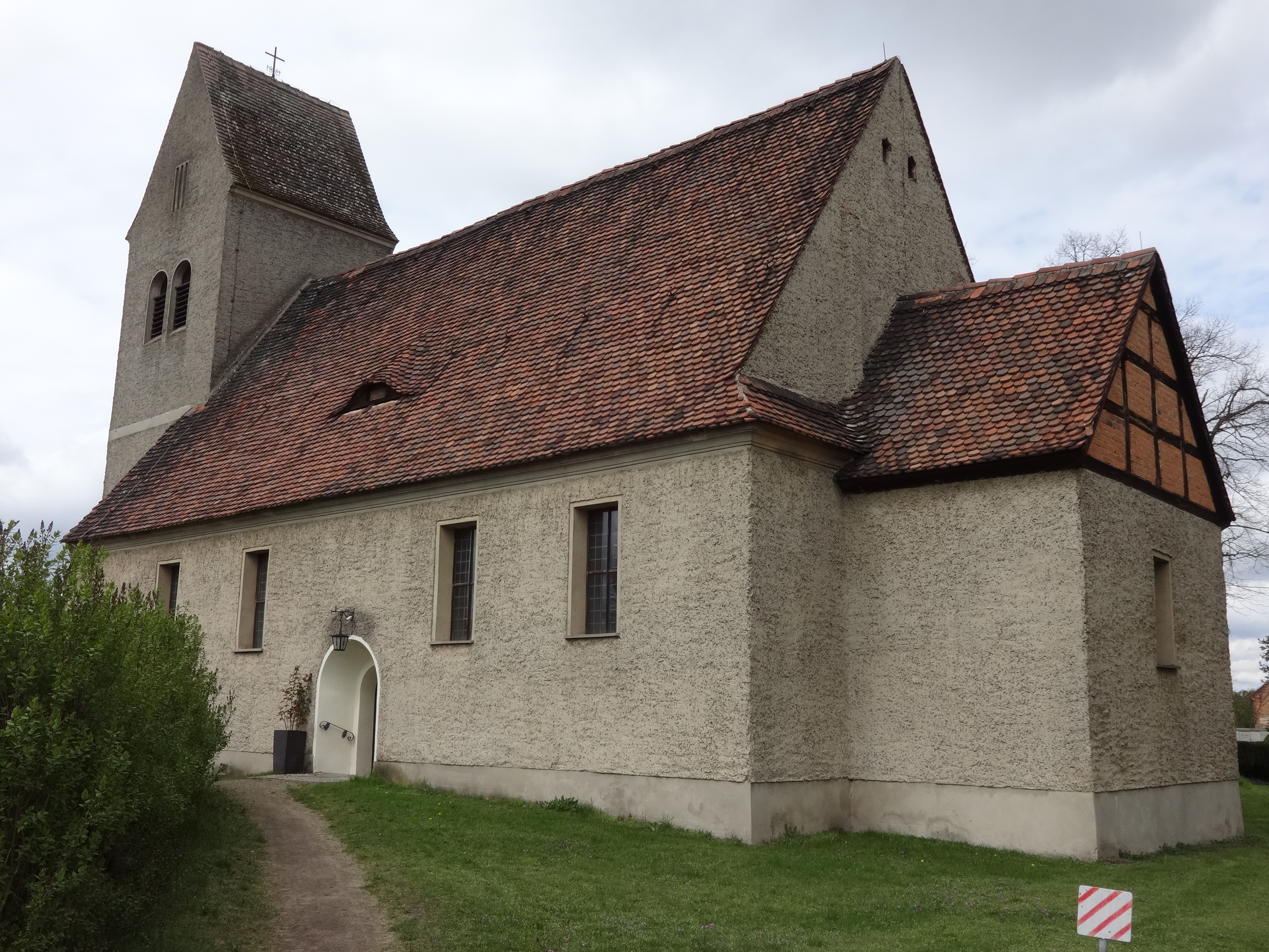 Die Dorfkirche in Trebbin ist ein Bauwerk aus dem 18. Jahrhundert, das vermutlich auf einem Vorgängerbau aus dem 14. Jahrhundert basiert. Im Innern befinden sich mehrere qualitätsvolle Ausstattungsstücke, darunter eine venezianische Fünte aus dem 11. Jahrhundert.